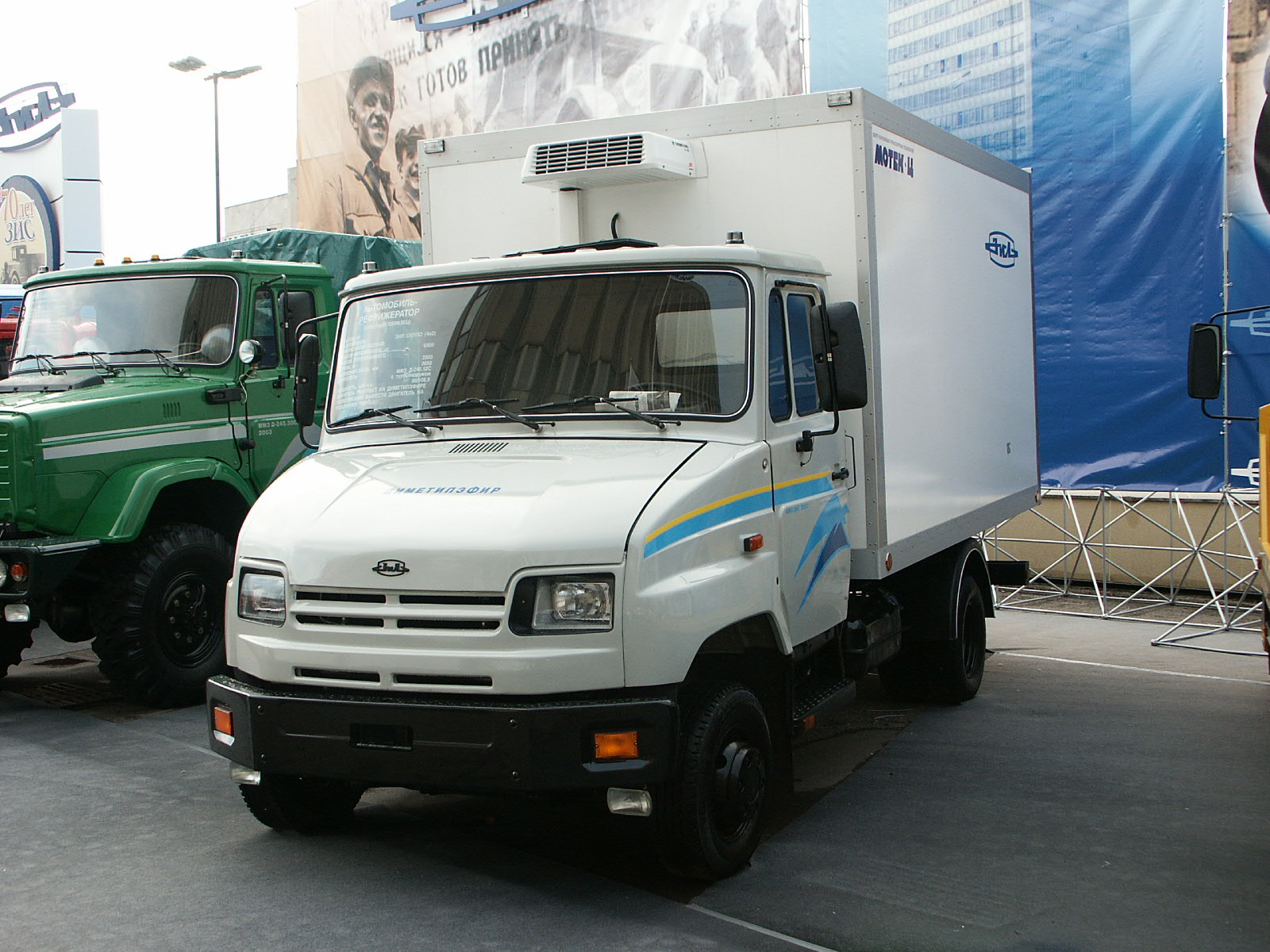 Фургон ЗИЛ-5301 на диметидэфире